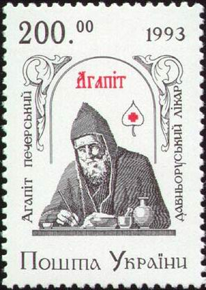 Агапіт Печерський — давньоруський лікар